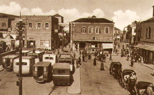 Hamra square - Haifa. it was the transportation hub of Haifa and the gate to Kasbah כיכר חמרה הייתה כיכר בצורת מלבן בעיר התחתית של חיפה תחילתה בבתקופה העות'מאנית. הכיכר התפתחה בצמוד לשער המערבי של "חיפה החדשה" שהייתה בין החומות. הכיכר שימשה כמרכז הפעילות של העיר כיכר חמרה בשנת 1930 . חניית הכרכרות על פי התקנות. יש הפרדה בעזרת איי תנועה בין שטחי החניה השונים